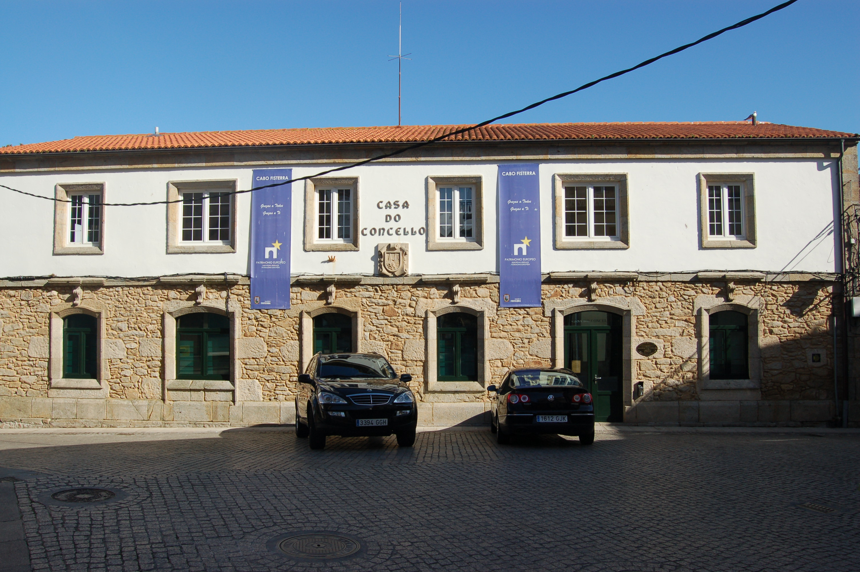 casa consistorial de Fisterra Fisterra Categoría:Imaxes de Fisterra